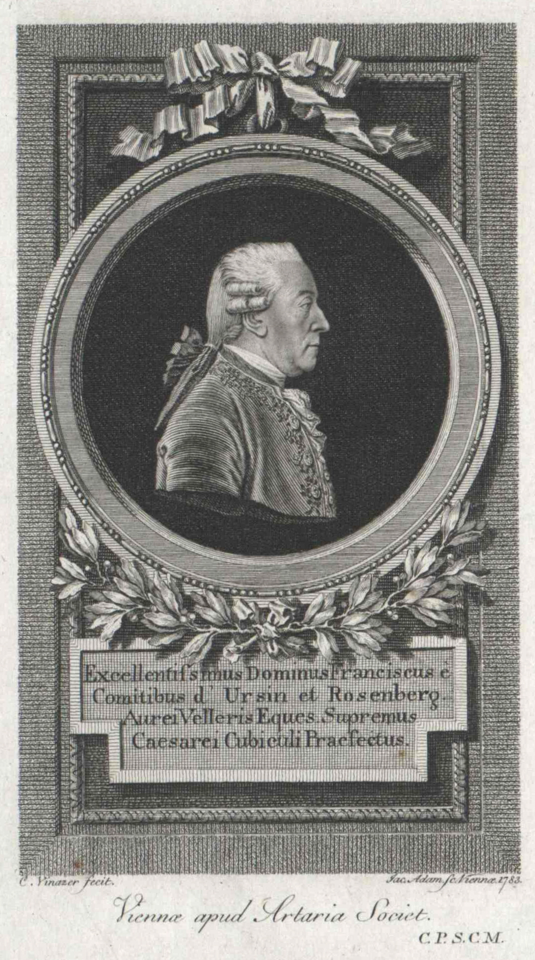 Franz Xaver Wolfgang von Orsini-Rosenberg (1723-1796), Austrian diplomat